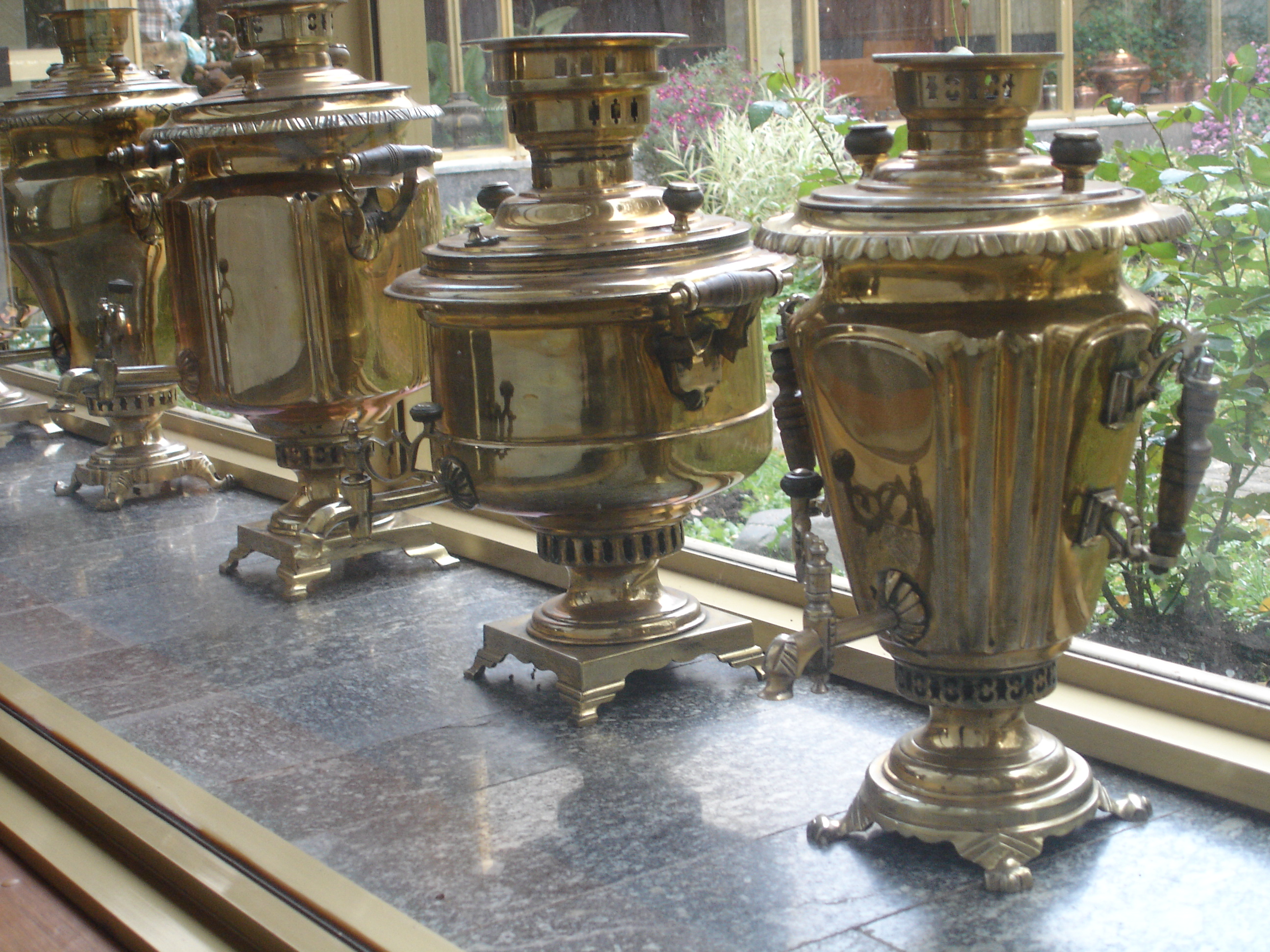 Самовары в Турцентре Суздаля. Samovars In Suzdal.